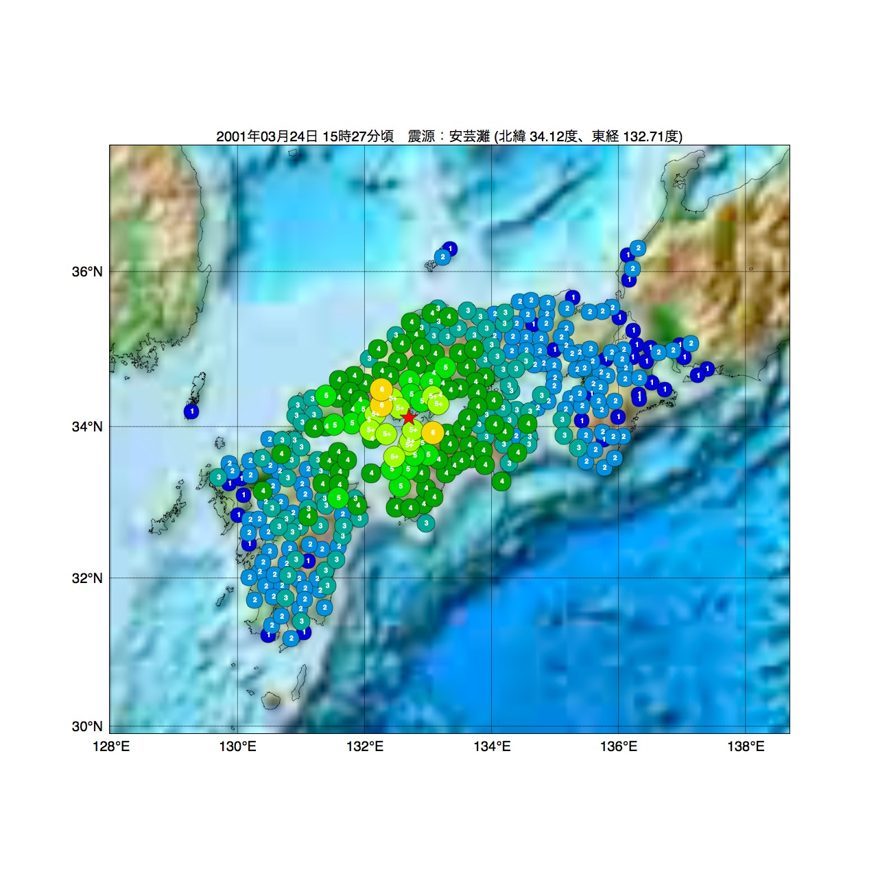 2001年03月24日 15時27分頃 芸予地震の震度分布 震源：安芸灘 (北緯 34.12度、東経 132.71度)